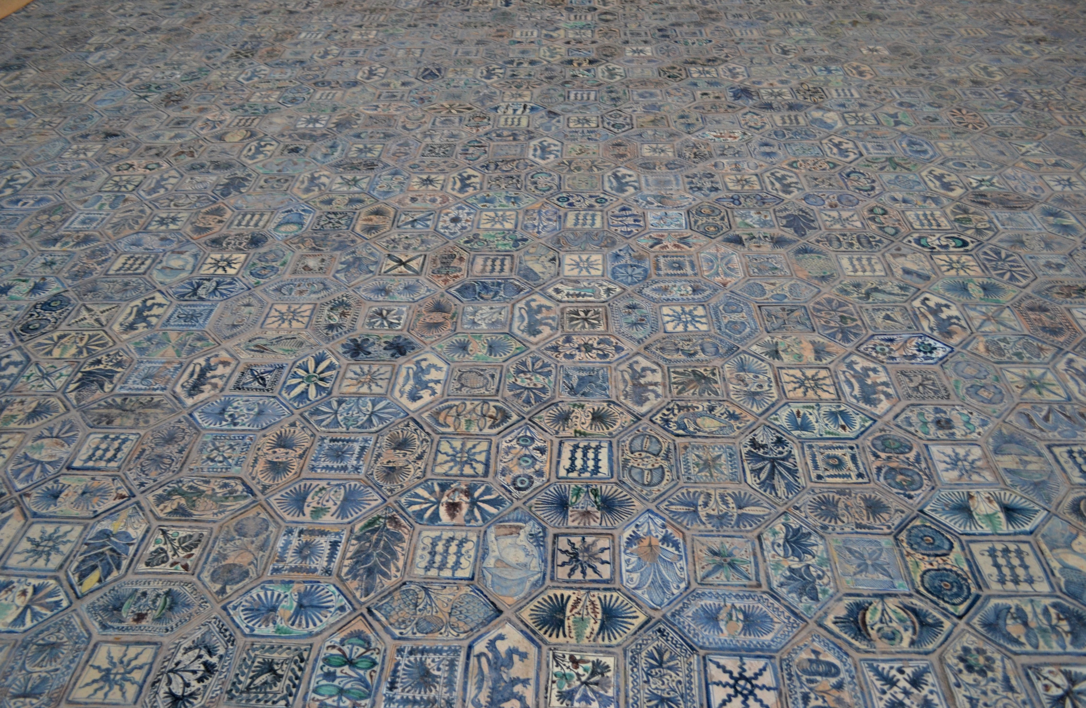 Cappello Caracciolo del Sole (Chiesa di San Giovanni a Carbonara di Napoli) - Pavimento maiolicato della metà del Quattrocento.